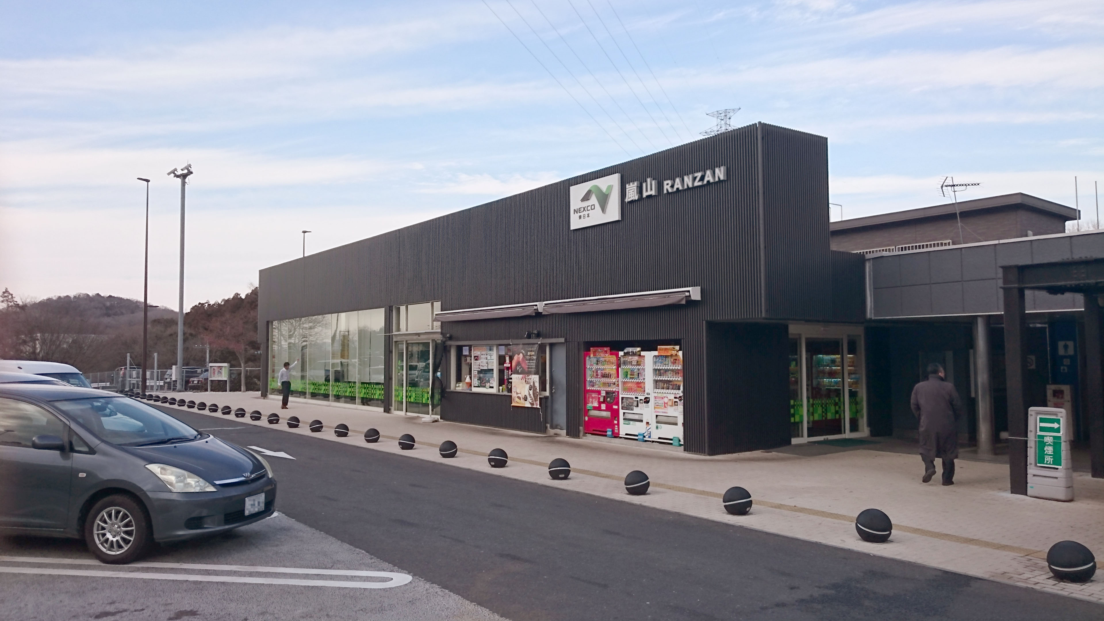 嵐山パーキングエリア上り線施設